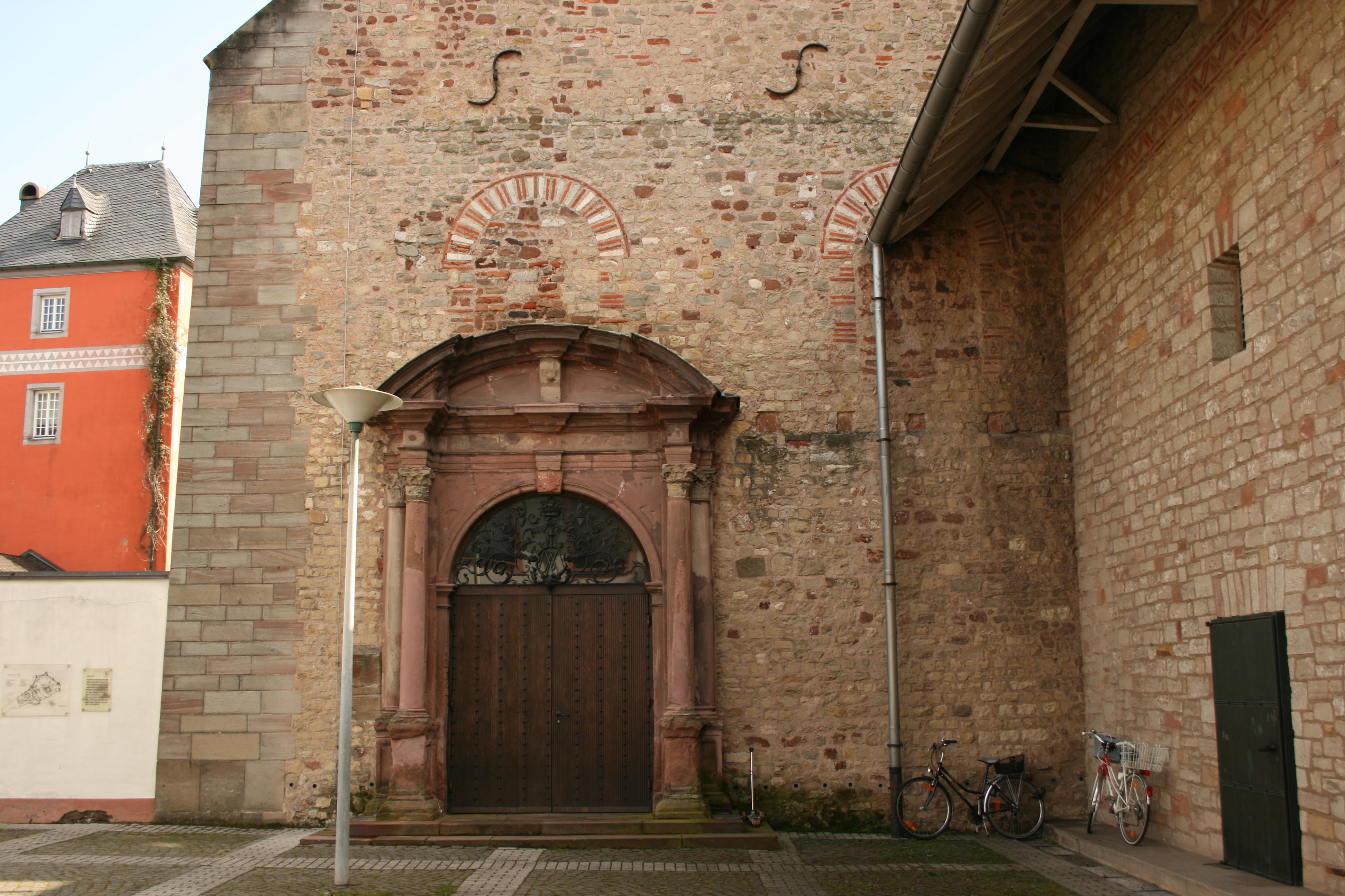 Trier-Pfalzel, Römisches Mauerwerk des Palatiolum in heutiger Kirche.